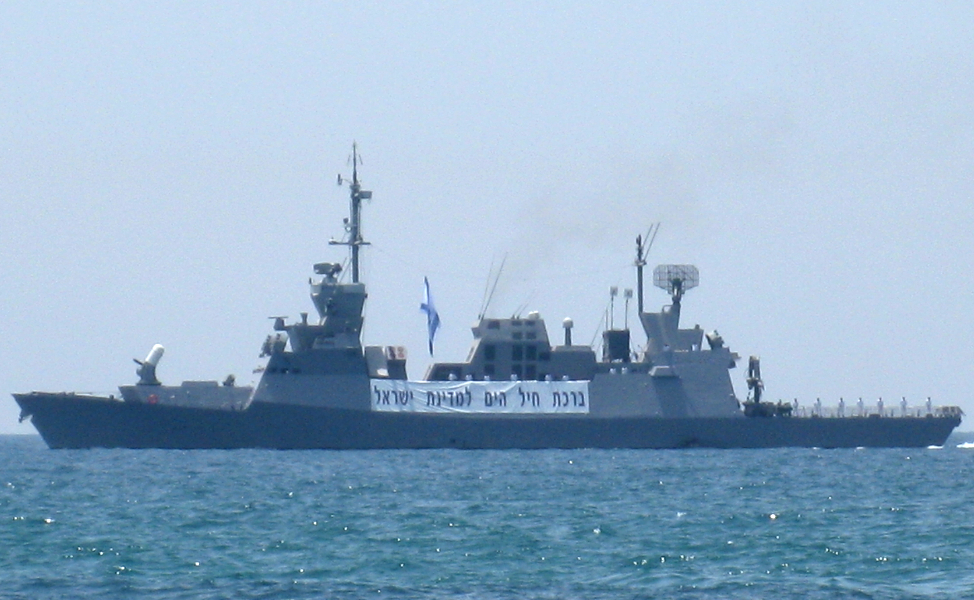 Naval Sail by on Tel Aviv Beach Saar 5 missile ship משט יום העצמאות ה-61 חוף הילטון